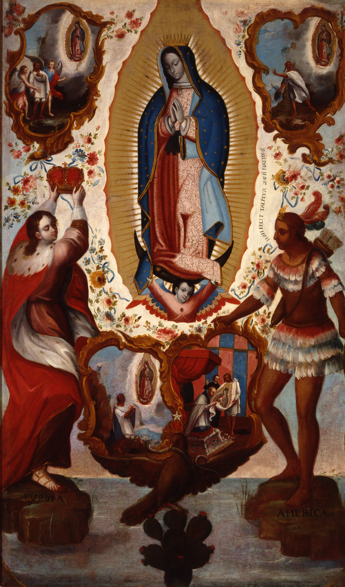 Josefus De Ribera Argomanis (siglo XVIII) Verdadero retrato de Santa María Virgen de Guadalupe, Patrona principal de Nueva España jurada en México, 1778. Óleo sobre tela. Museo de la Basílica de Guadalupe.